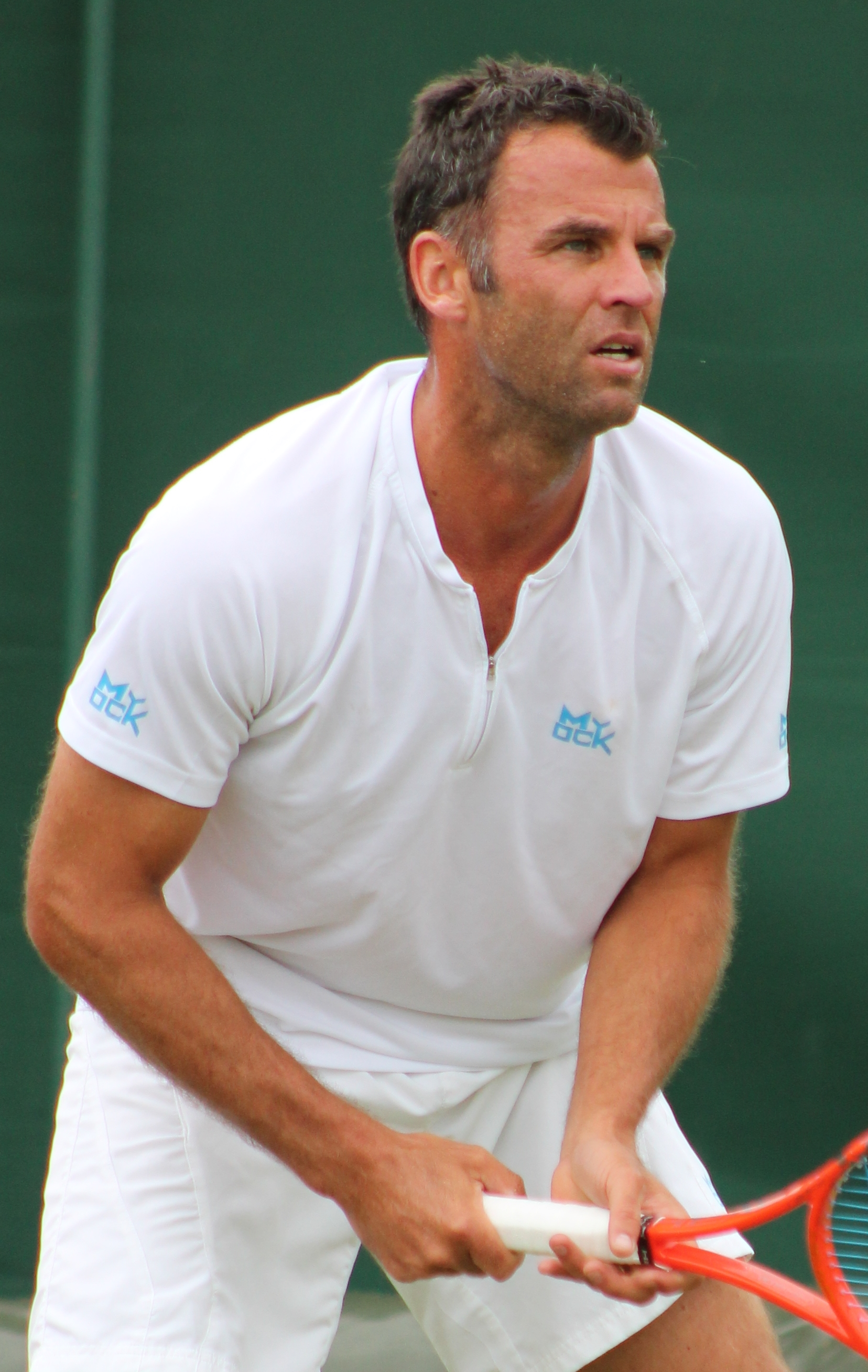 Gicquel WMQ14 (3)